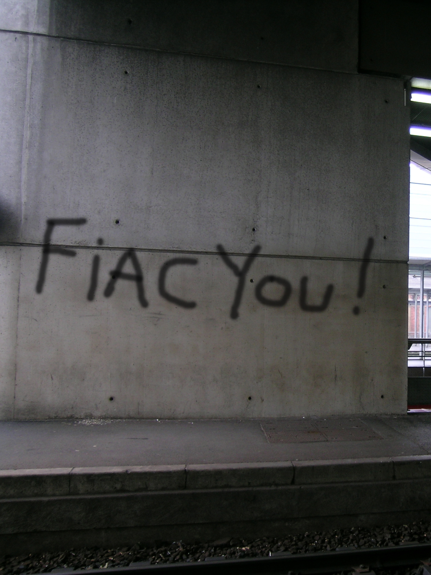 Graffiti à propos de la FIAC